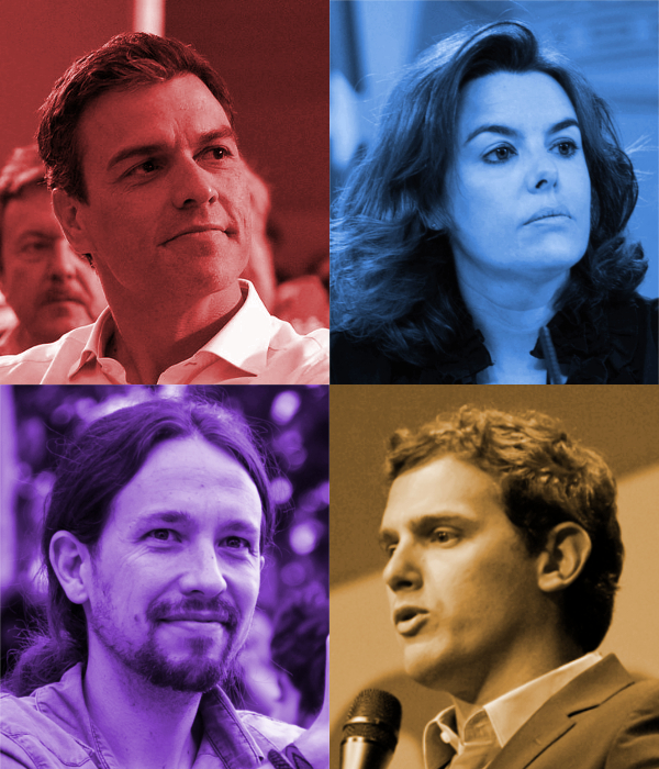 Montaje fotográfico de los participantes en el debate a cuatro de Atresmedia (2015)